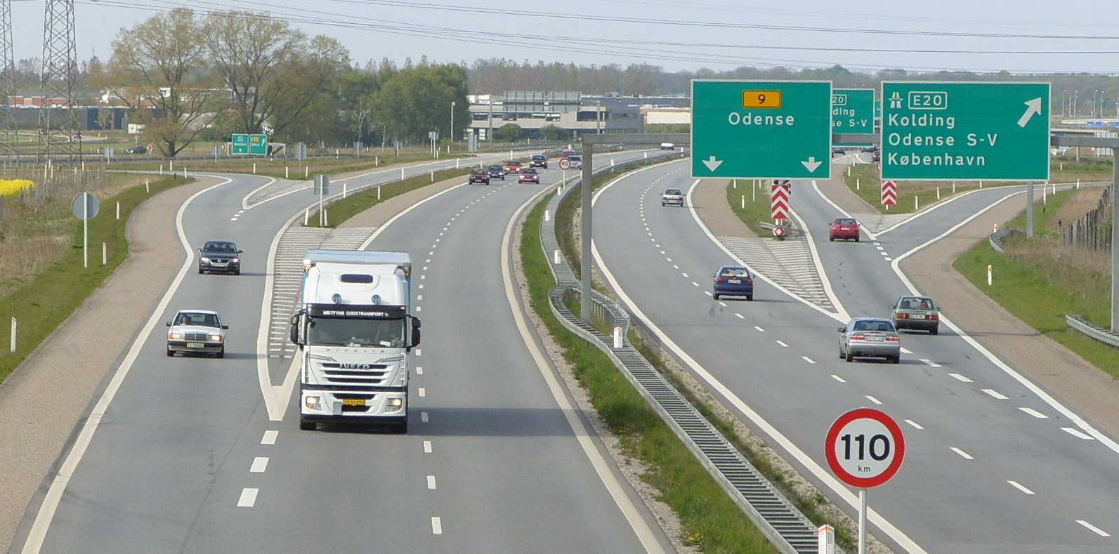 South of Motorvejskryds Odense on Svendborgmotorvejen